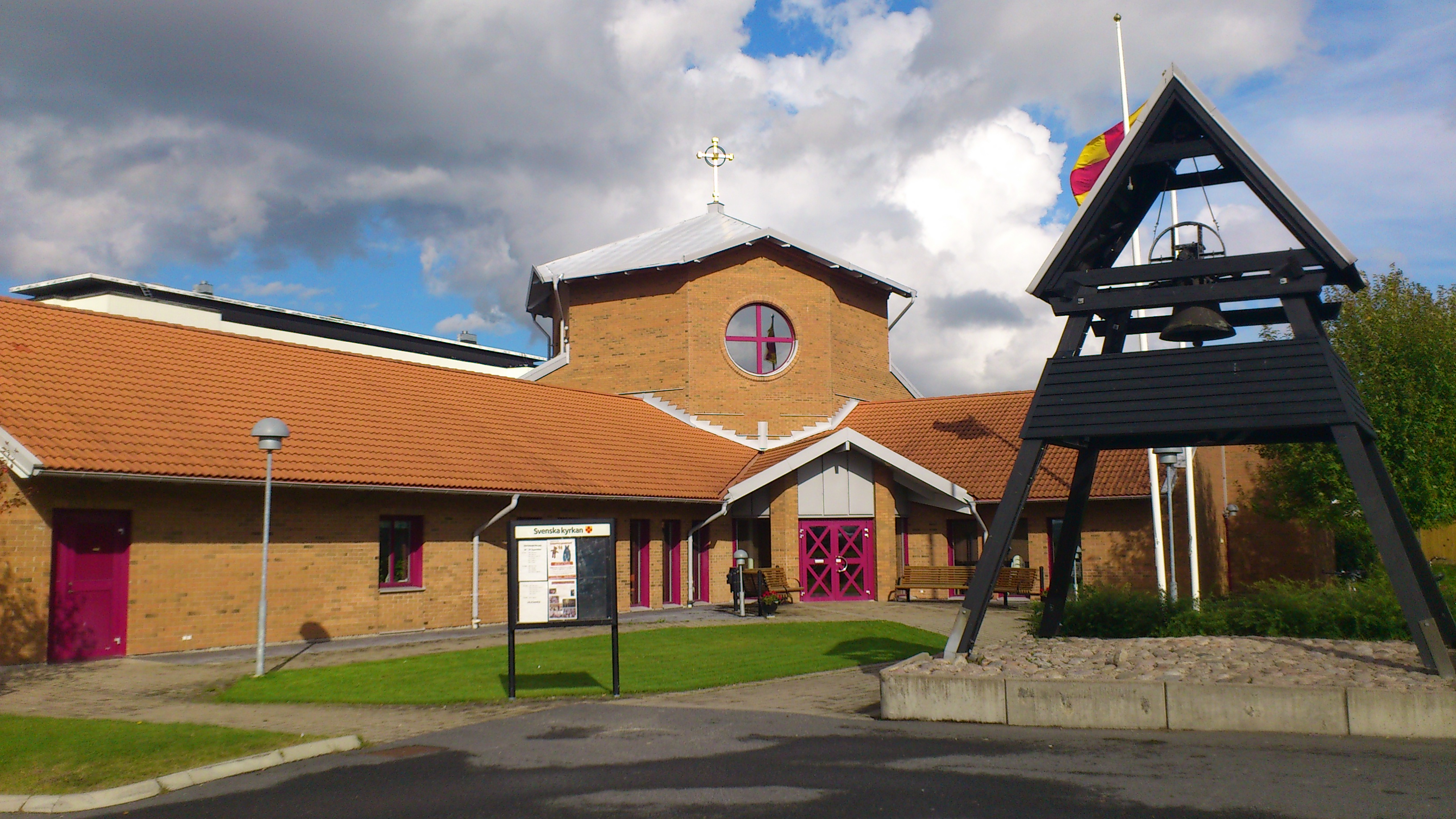 Ekhagen (Vandringsmannen 1)